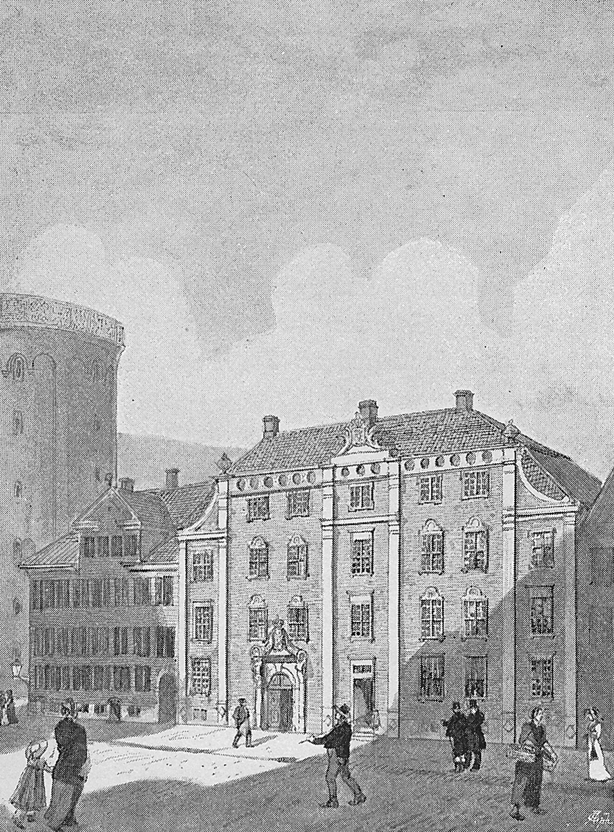 Den kongelige Porcelænsfabrik i Købmagergade i København i første halvdel af 1800-tallet.